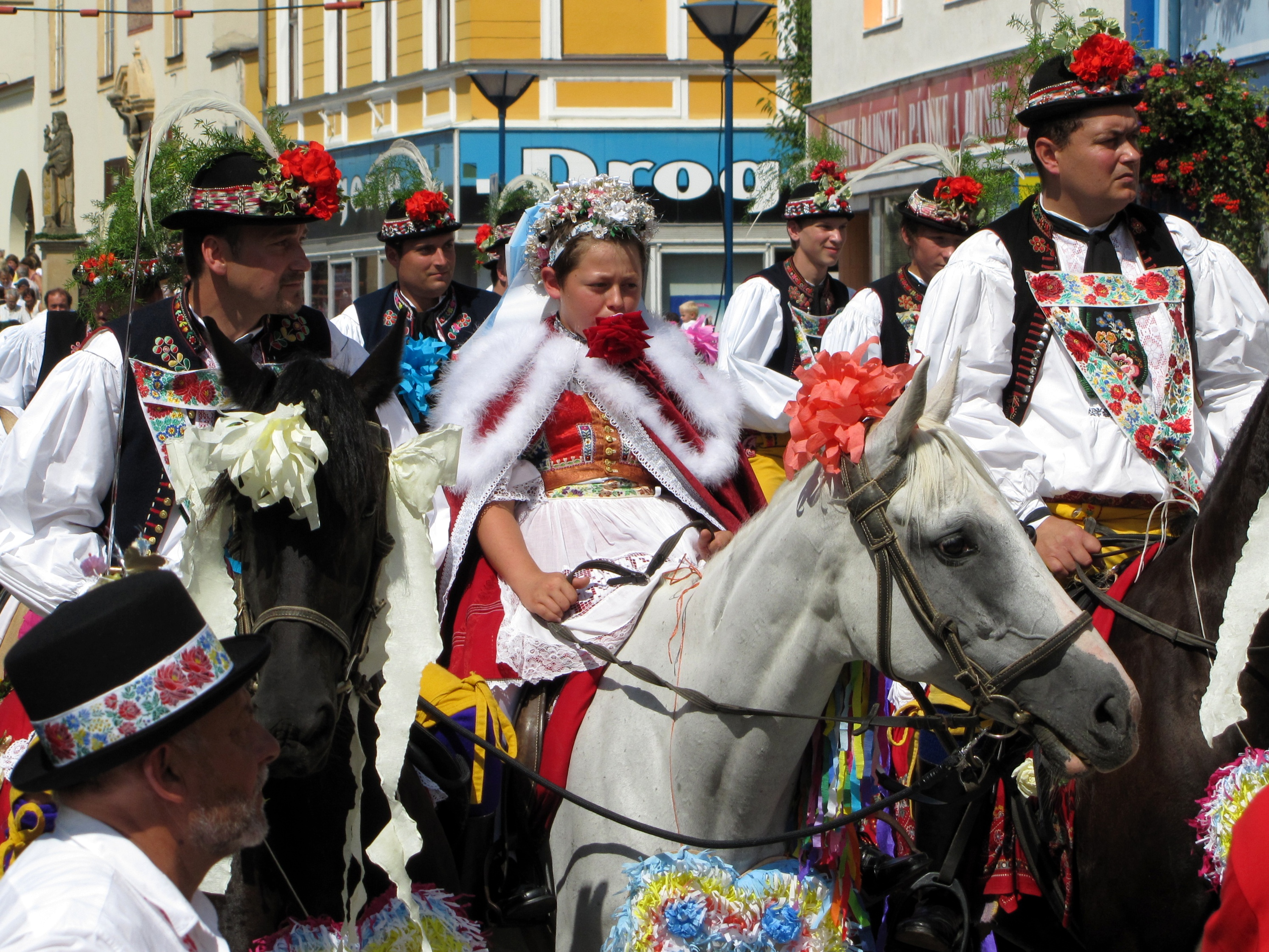 Jízda králů na Slováckém roku 2011 v Kyjově